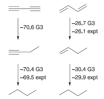 Cálculo da entalpia de formação para butadiino e butadieno em kcal/ mol